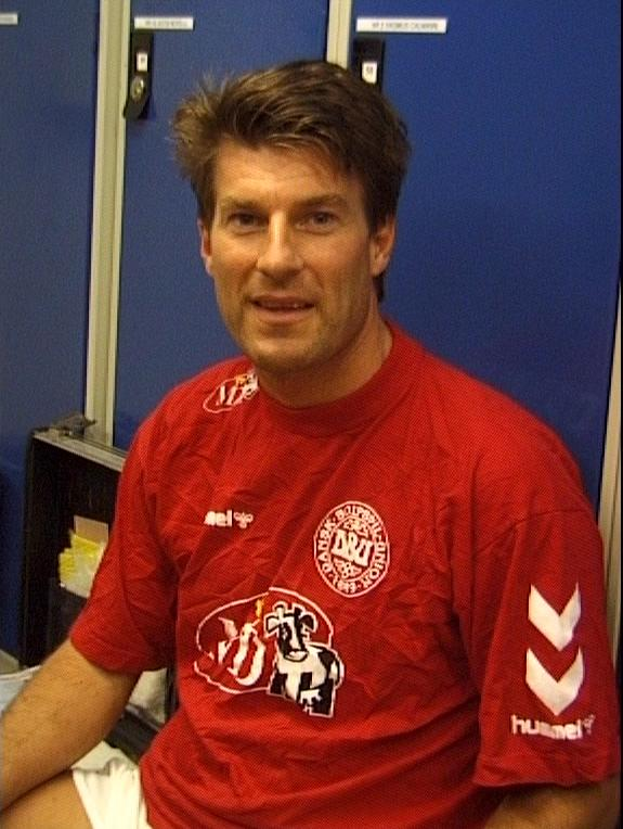 Michael Laudrup